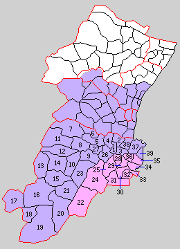 三重県一志郡の町村制時点の町村。